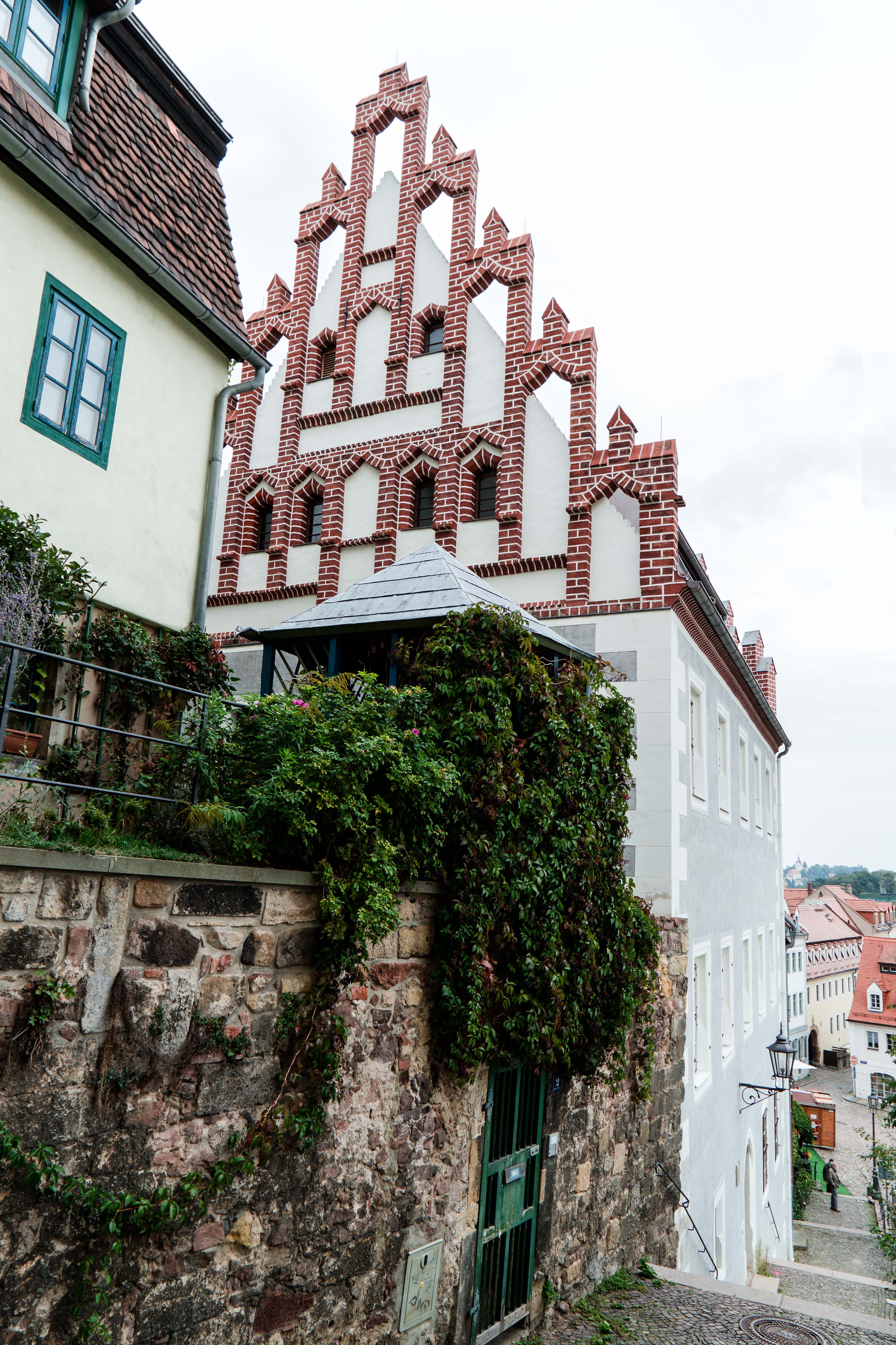 Prägnanter Staffelgiebel des Prälatenhaus, ein spätgotisches Domherrenhaus, Rote Stufen 3 in Meißen